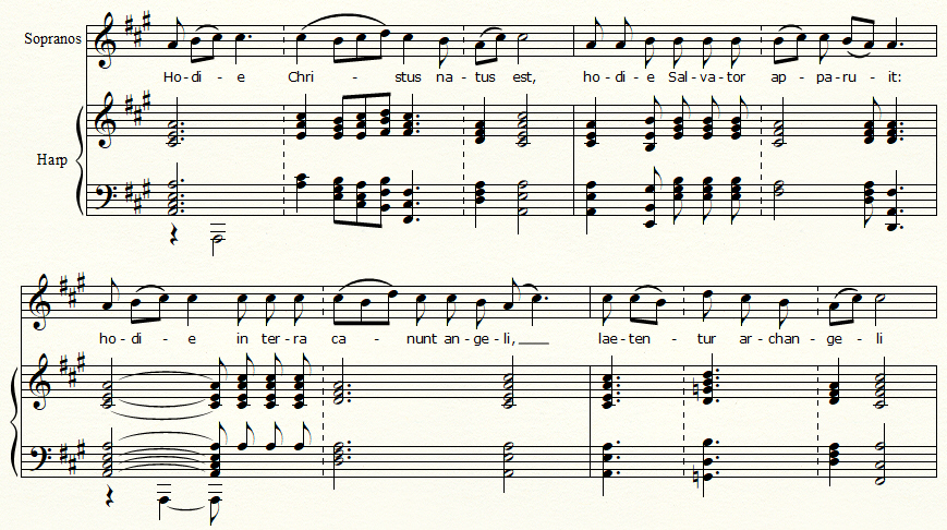 антифон 'Hodie Christus natus est' (гармонизация Бриттена, фрагмент)